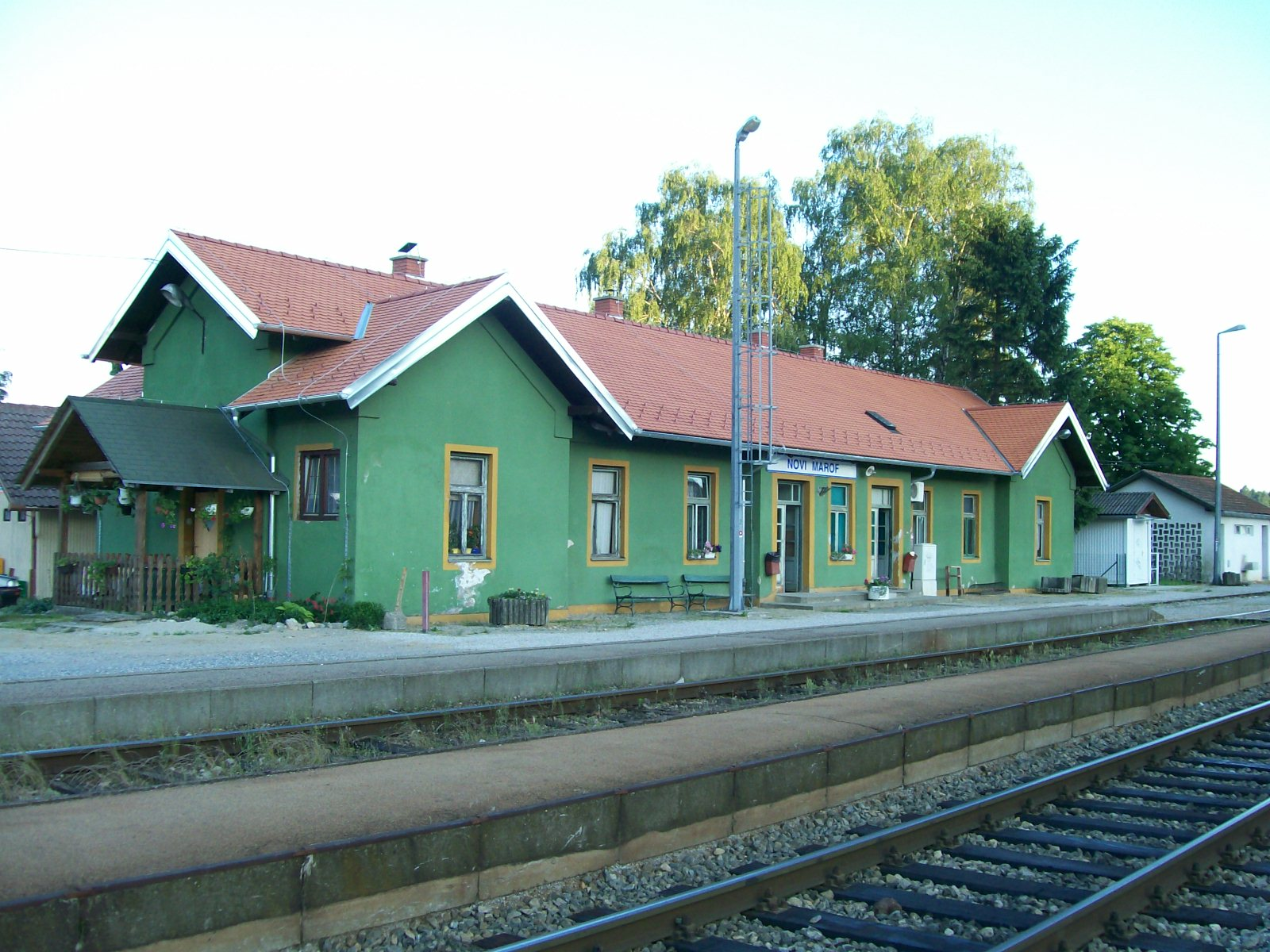 Žejeznička stanica Novi Marof